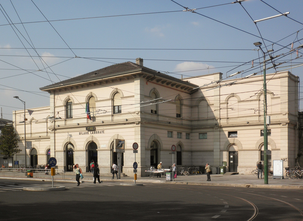 Il vecchio fabbricato viaggiatori della stazione ferroviaria di Milano Lambrate, posto in piazza Bottini